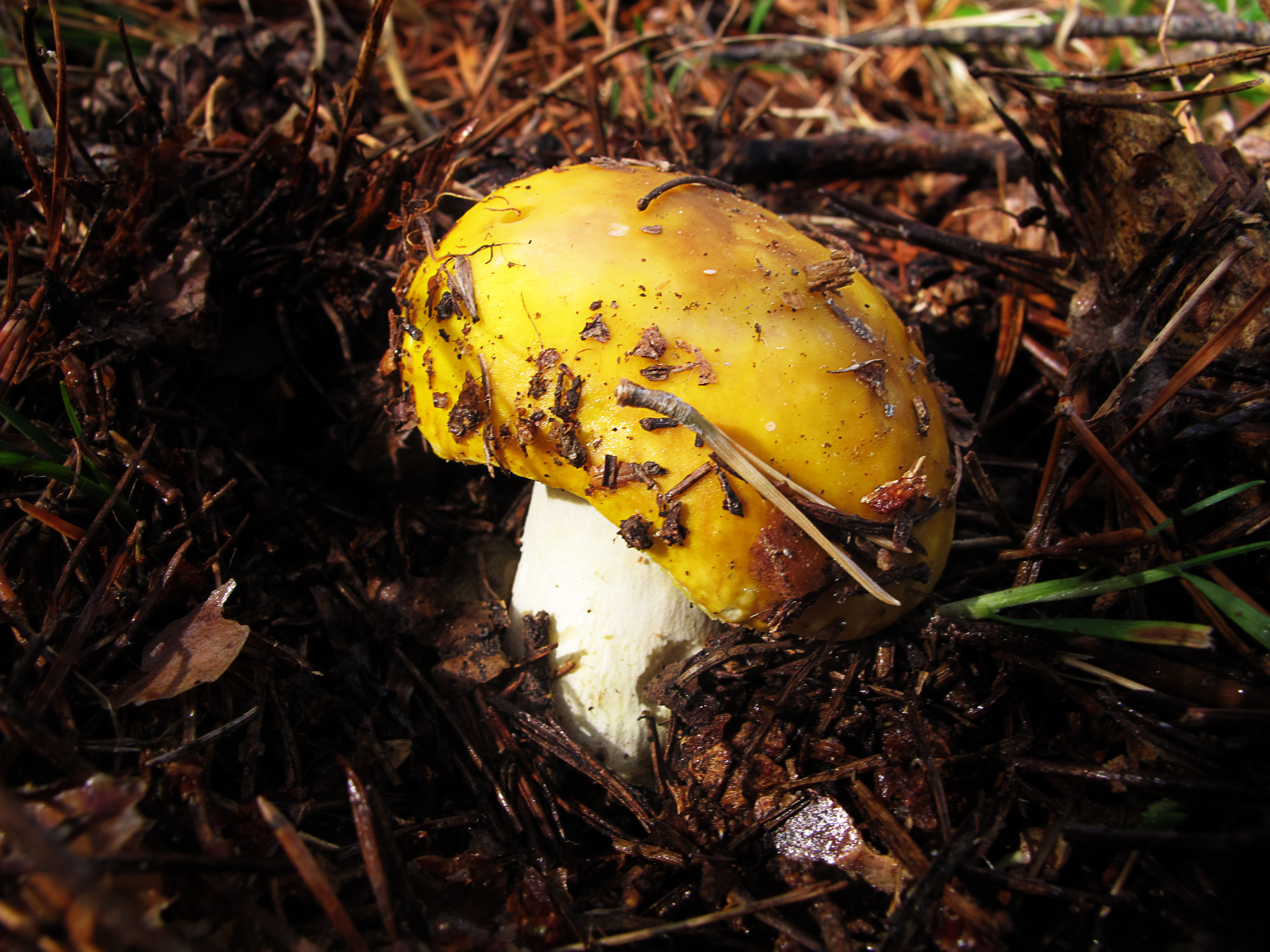 Bosques de coníferas, prefiriendo zonas de montaña. En bosque de pino rojo Cuidado con las setas que recogeis, si no conocéis perfectamente la especie dejadla en el monte.